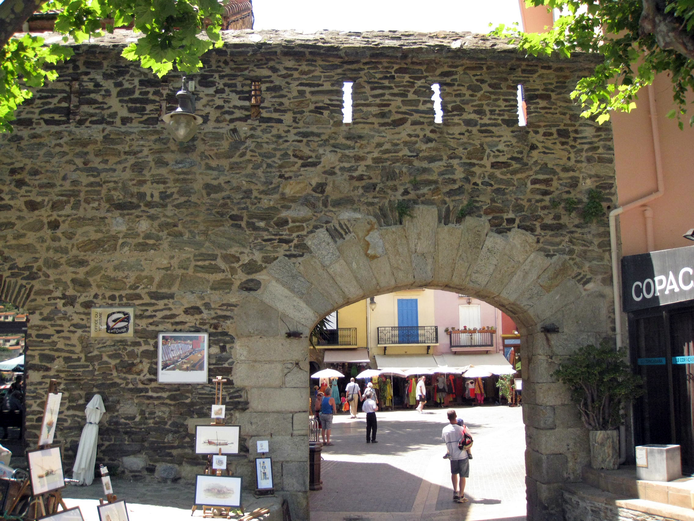 Fortificació de l'Artilleria i muralles (Cotlliure)